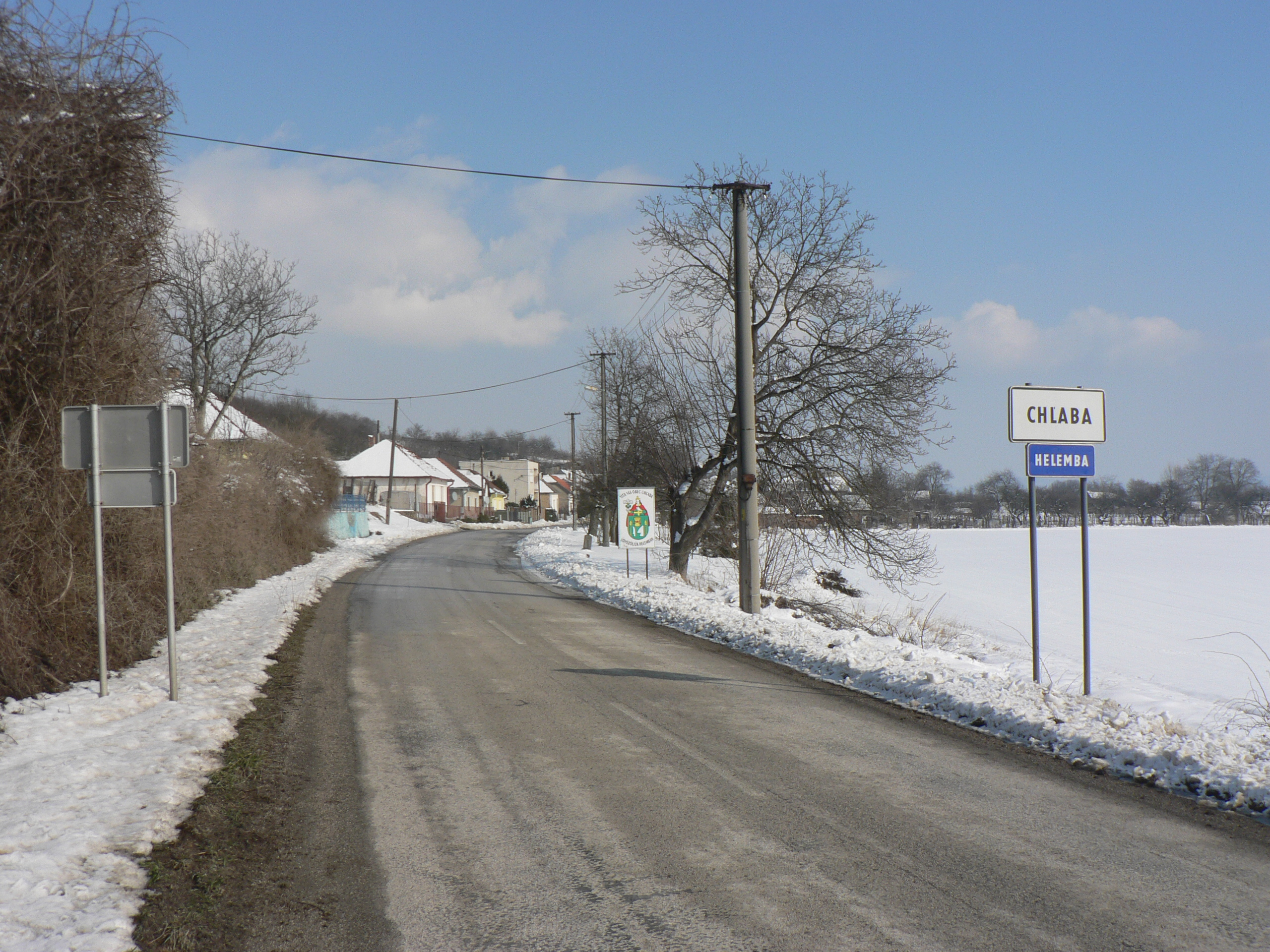 Hellenbach